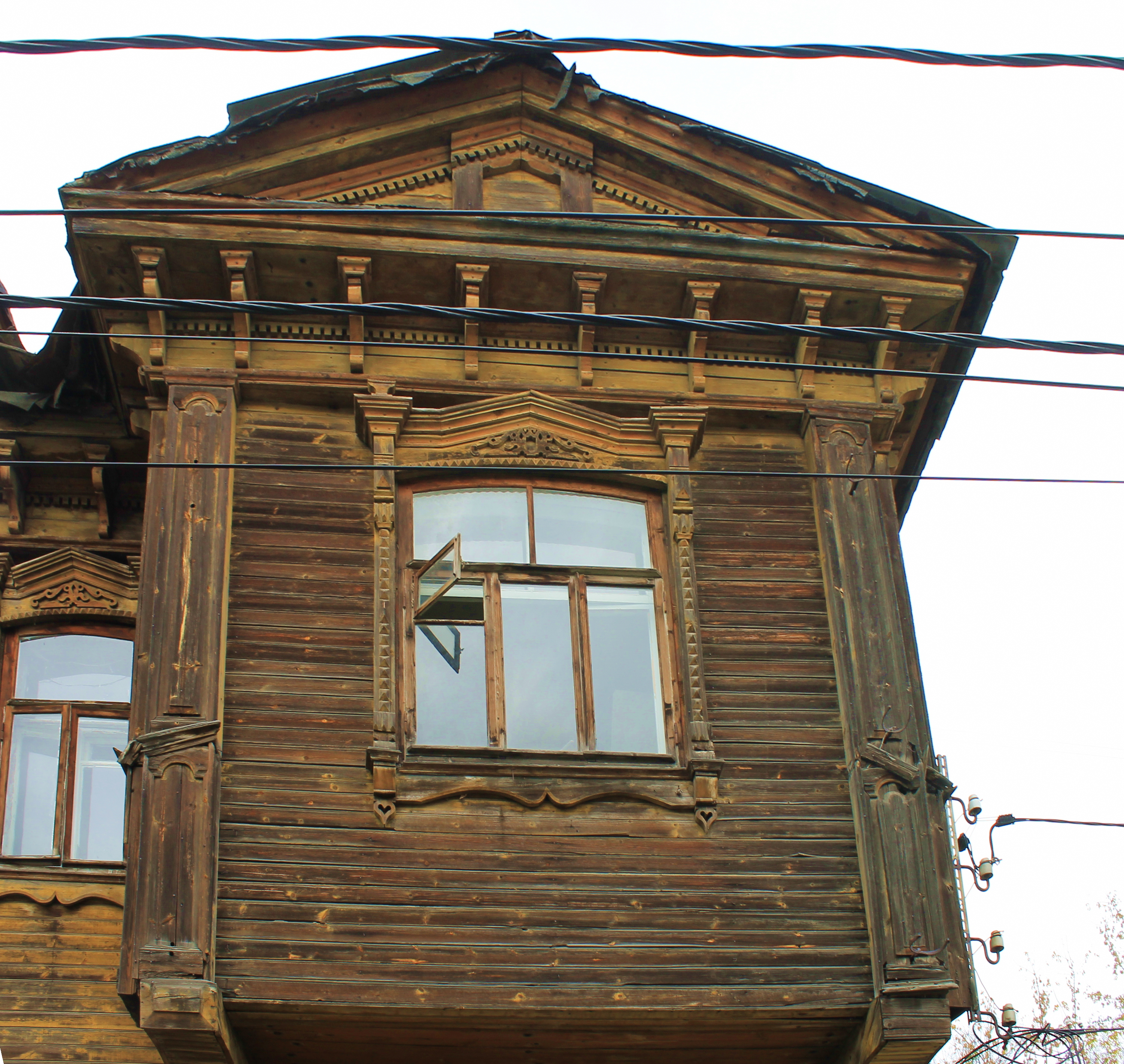 Жилой дом: улица Славянская, 4, Нижний Новгород, Нижегородская область